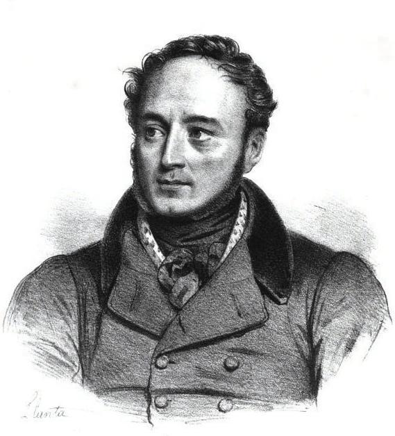 Louis Belmontet, French poet and politican.